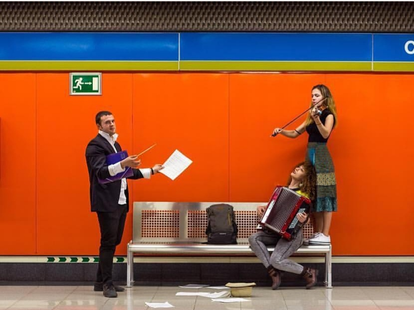 muziko okaze de la centjariĝo